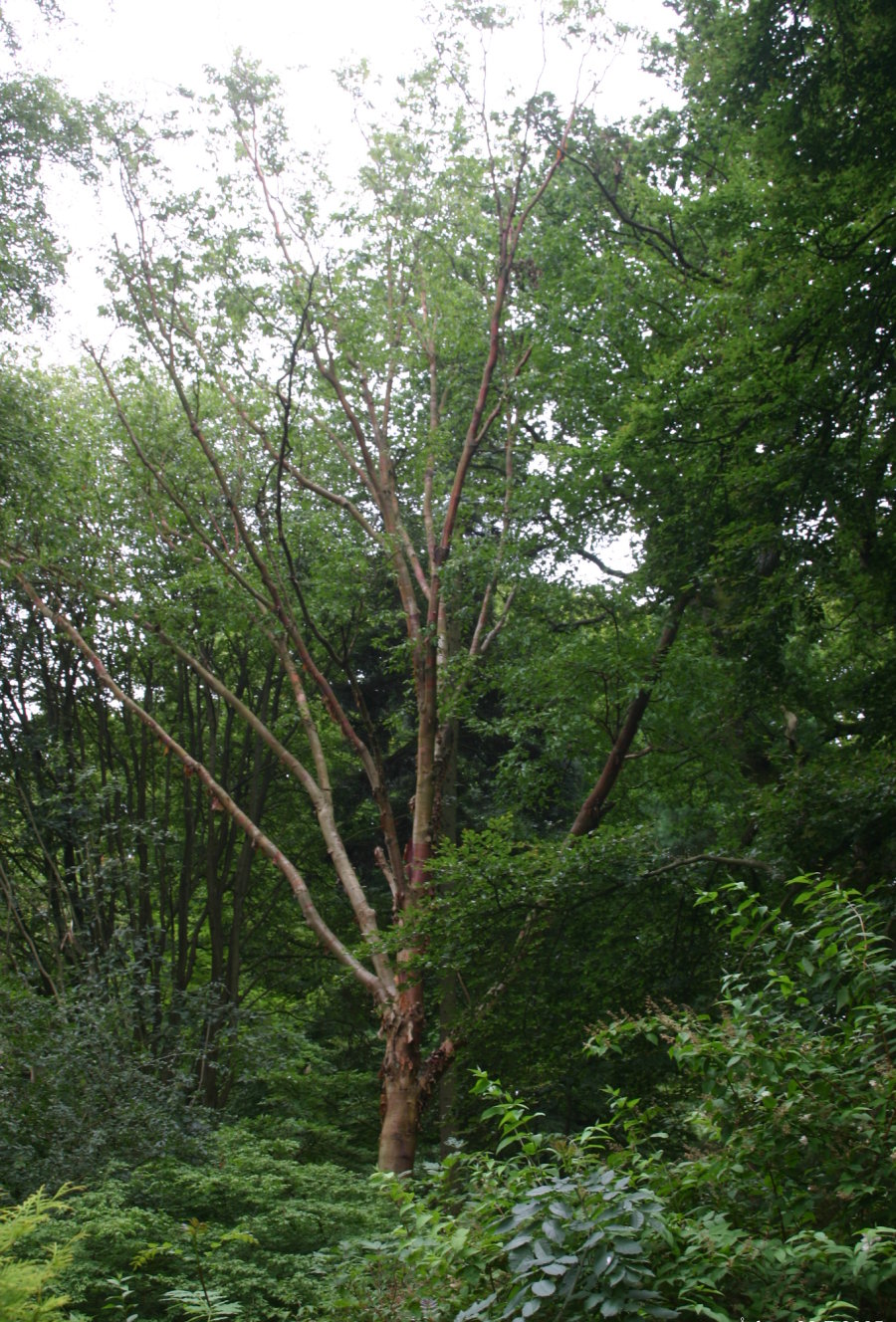 Betula albosinensis: Habit and bark.